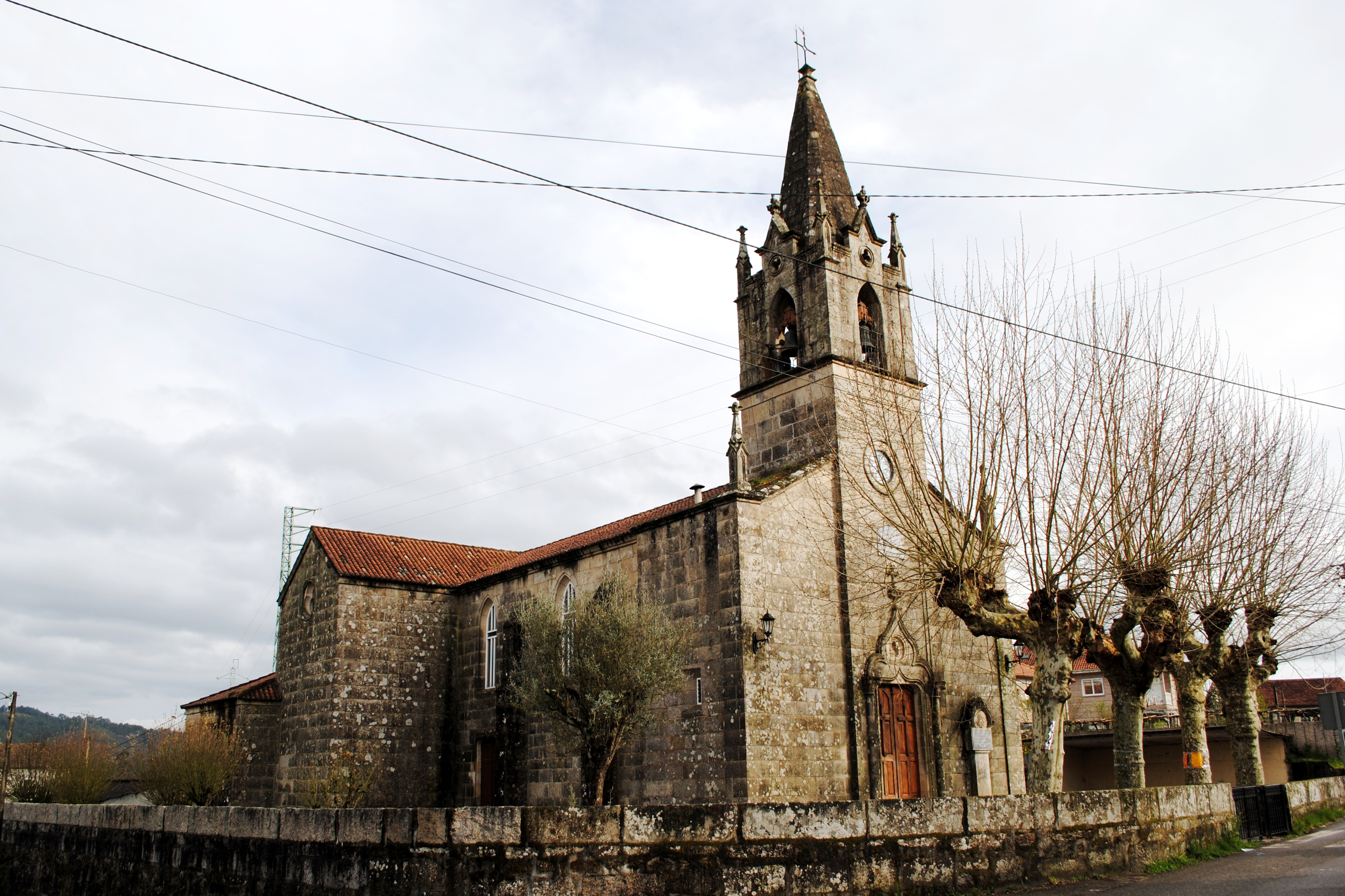 Iglesia parroquial de San Xurxo de Ribadetea, Ponteareas.